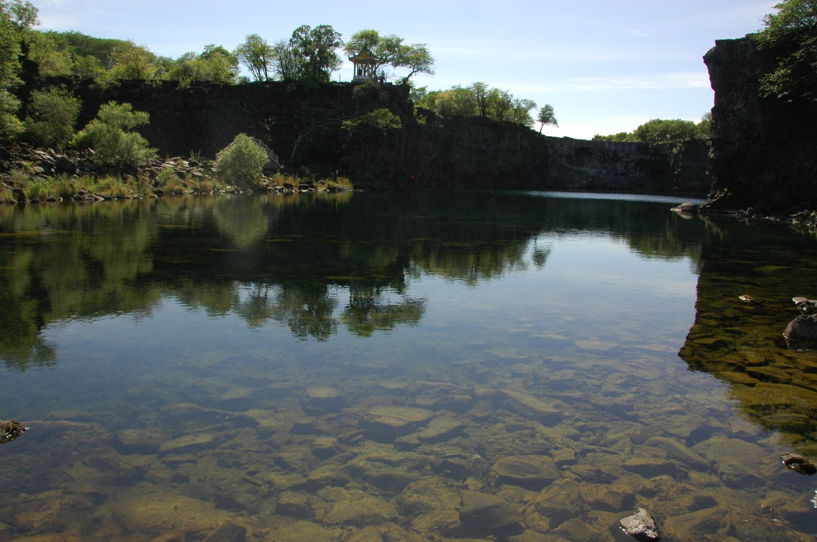 Jingpo Lake